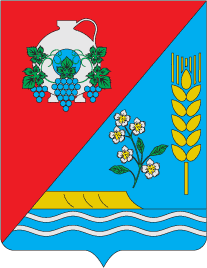 Герб села Котловина